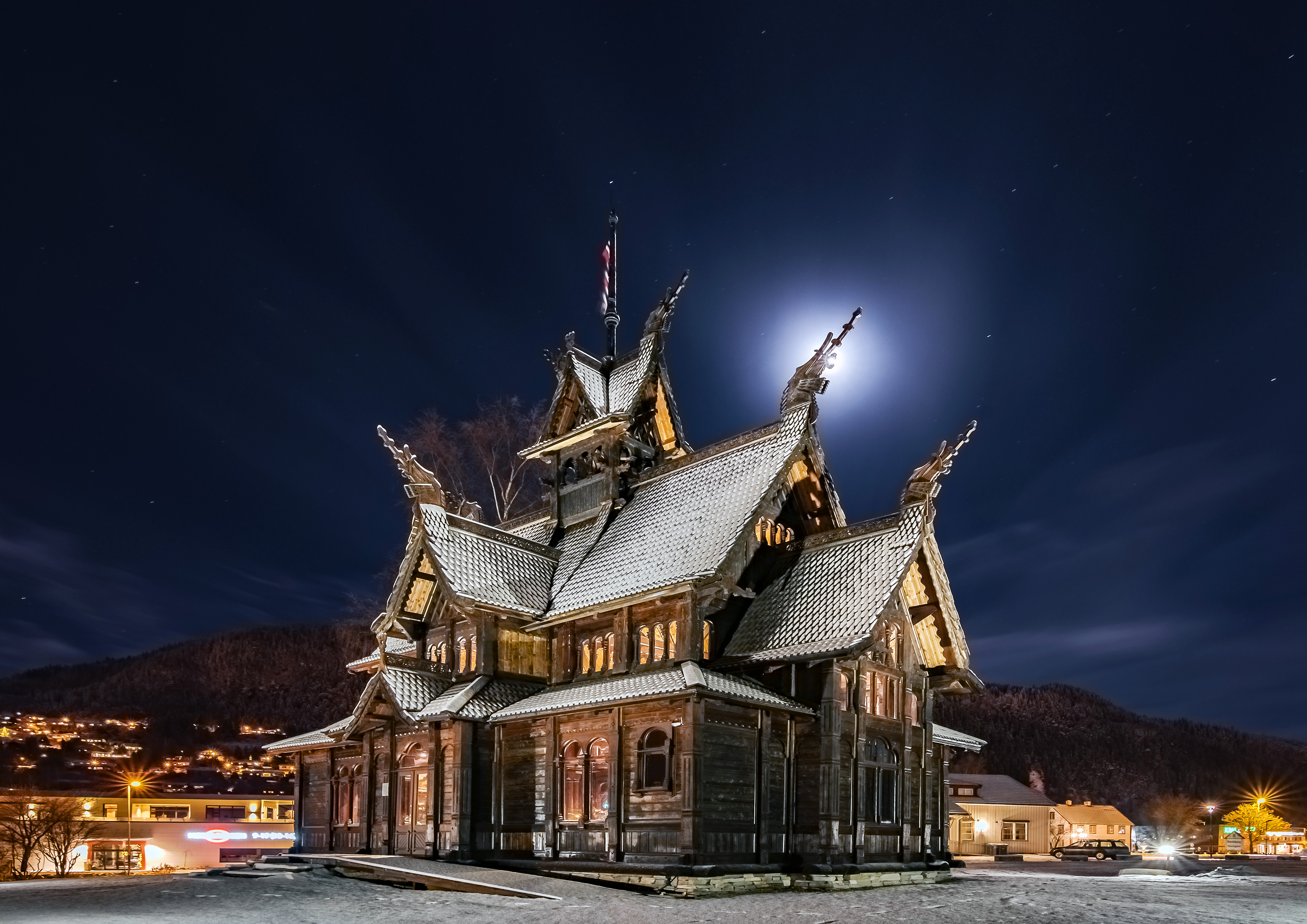 Thamspaviljongen het The Norway Building under sine 122 år i USA.